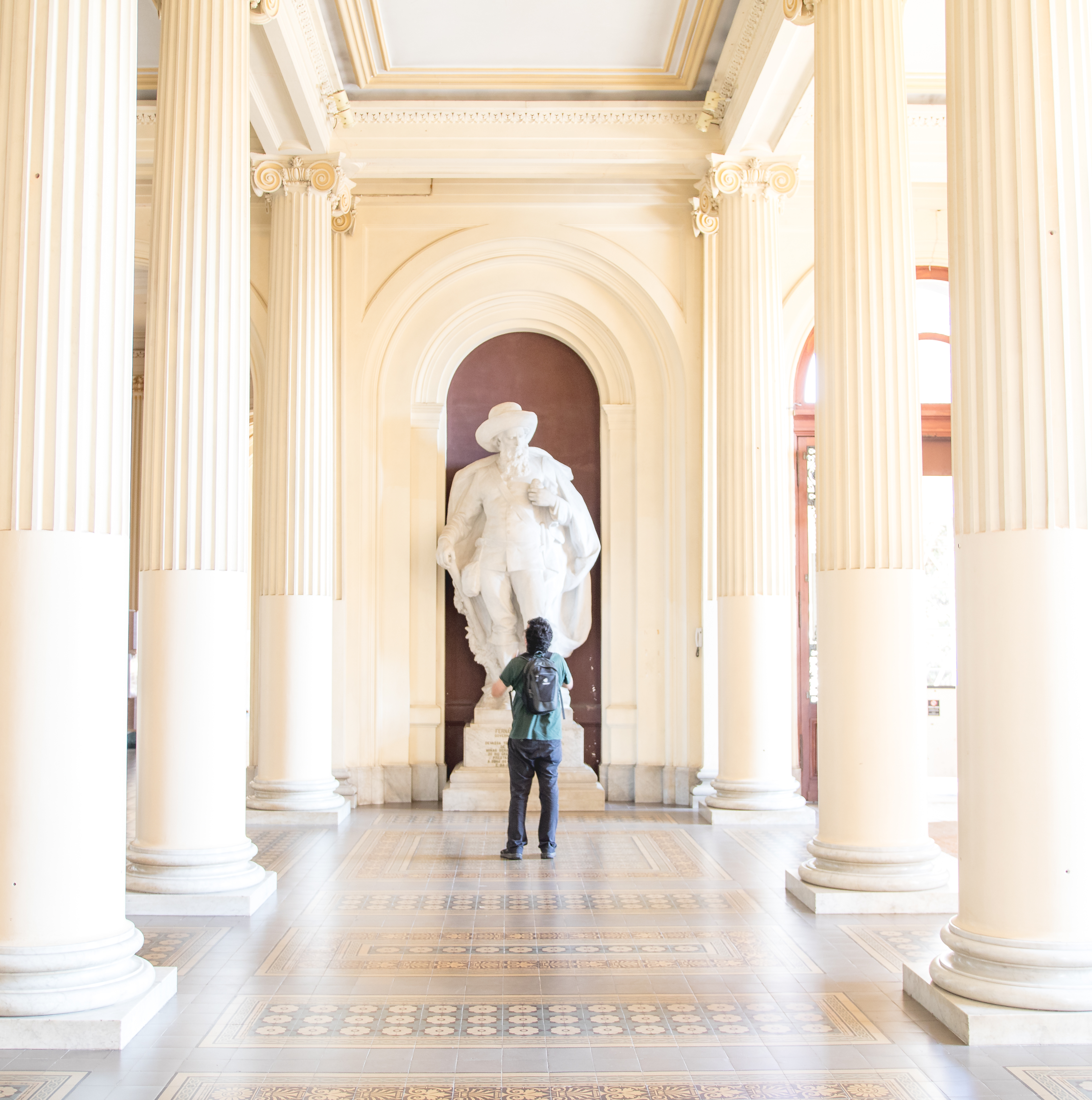 Museu Paulista em reforma